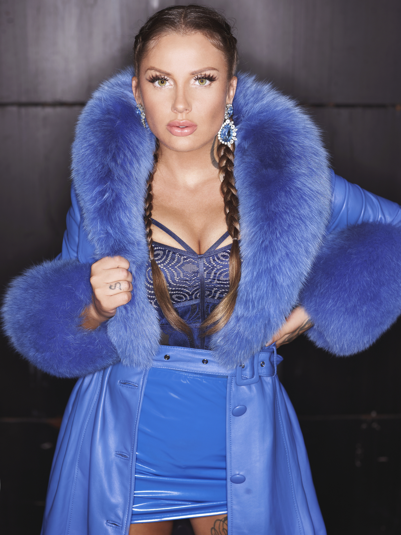 Pressefoto der Rapperin Schwesta Ewa